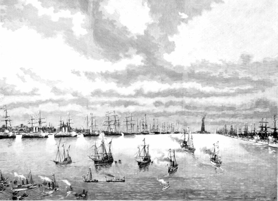 Revista Naval de Nueva York. Estados Unidos de América.